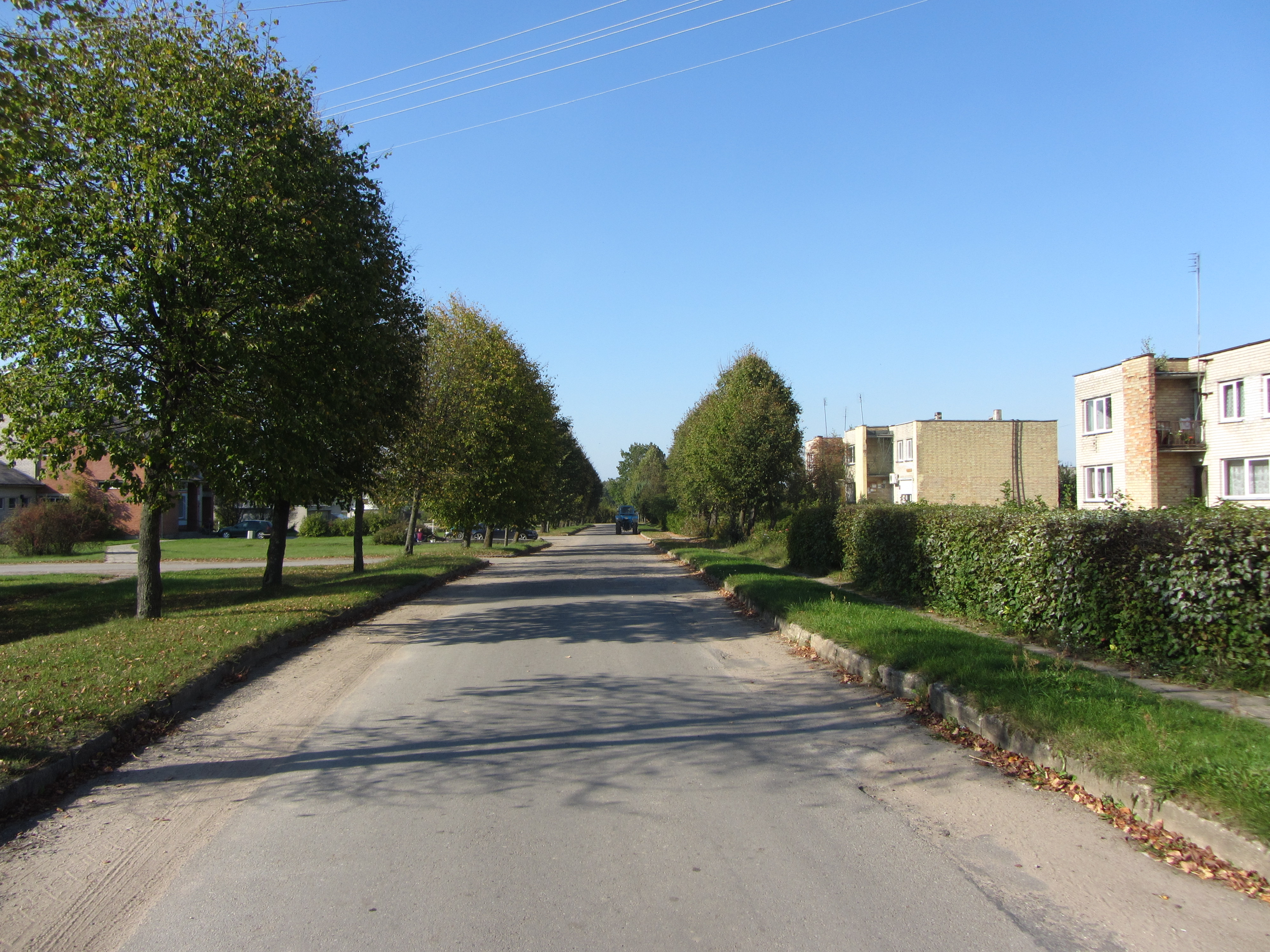 Puodžiai, Lithuania